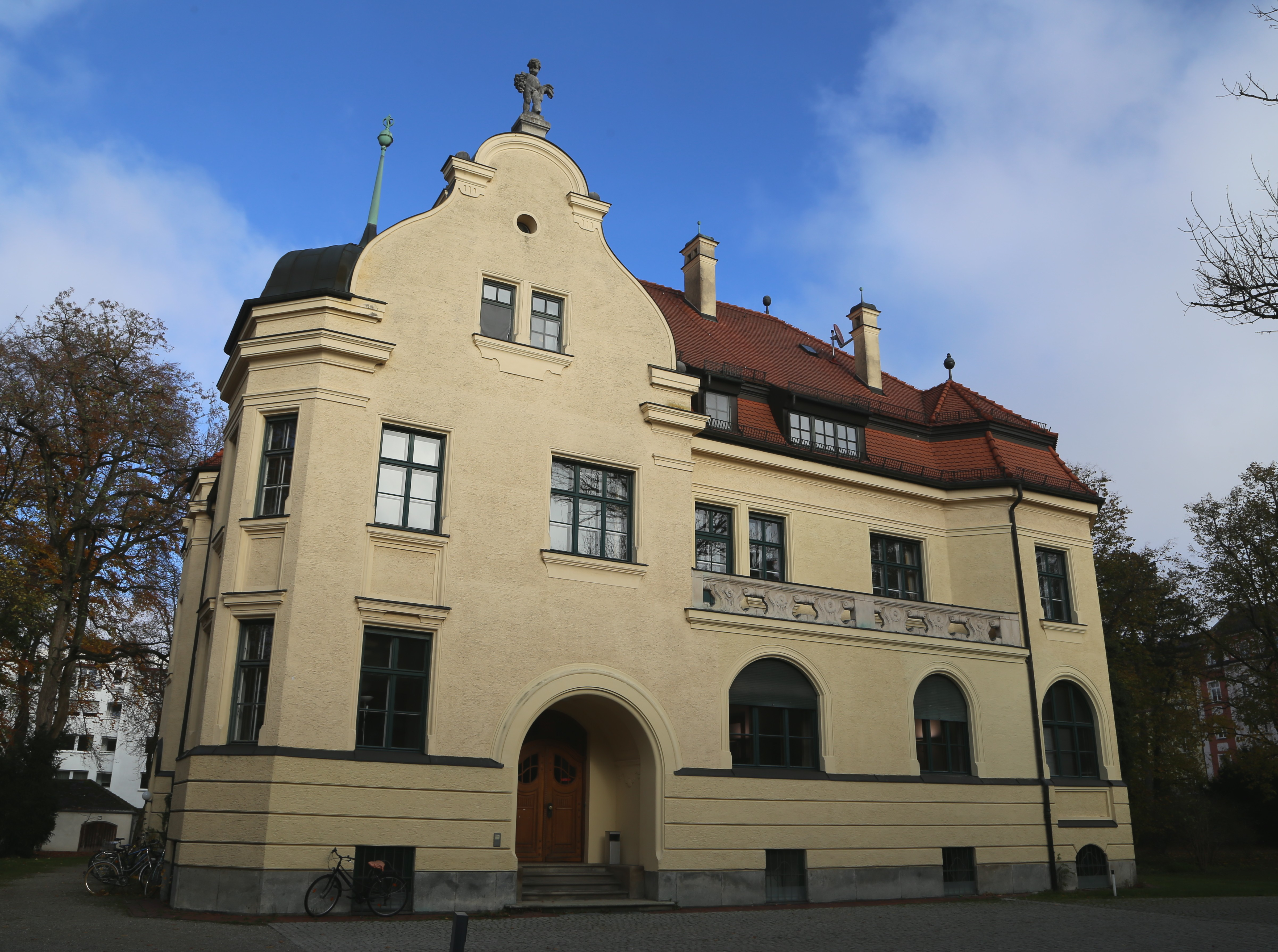 Ismaninger Straße 95, München; Bürgermeistervilla, schlossartige Neubarock-Villa, 1898 von Paul Pfann und Günther Blumentritt für Josef Selmayr, in großem Garten; Portalgitter an der Ismaninger Straße, gegliederte Gartenmauer an der Händelstraße, Terrassenmauer an der Ecke Weberstraße und Eisenzaun, sowie Tor an der Weberstraße.